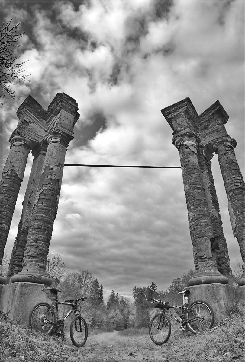 Івницький, Андрушівський р-н, ДП «Коростишівське ЛГ», Івницьке лісництво, кв. 82